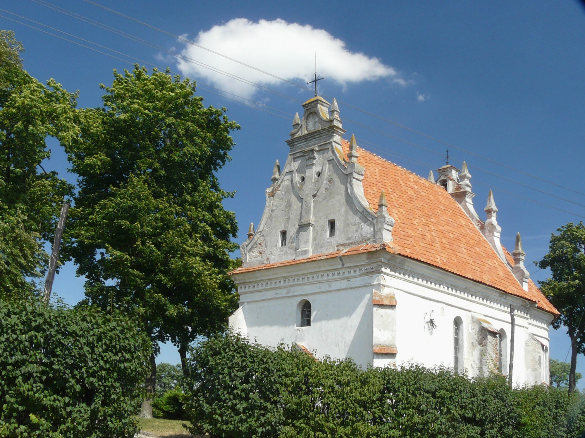 renesansowy kościół w Końskowoli